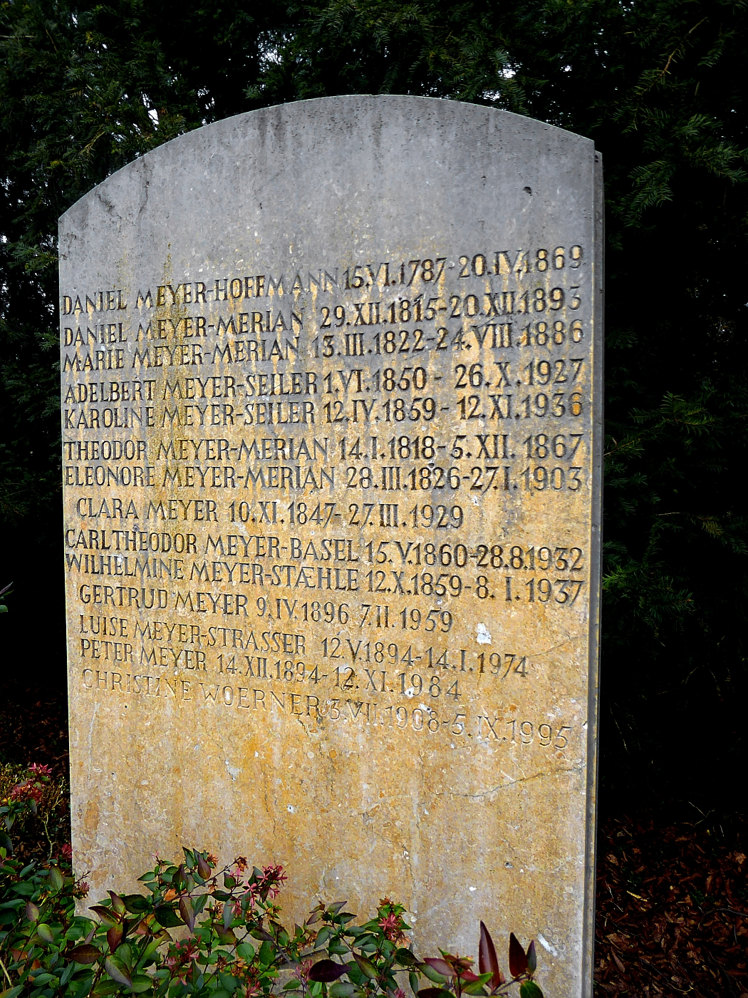 Peter Meyer (1894–1984) Architekt, Kunsthistoriker, Extraordinarius für Kunstgeschichte des Mittelalter und der Neuzeit an der Universität Zürich, Familiengrab auf dem Friedhof Hörnli, Riehen, Basel-Stadt